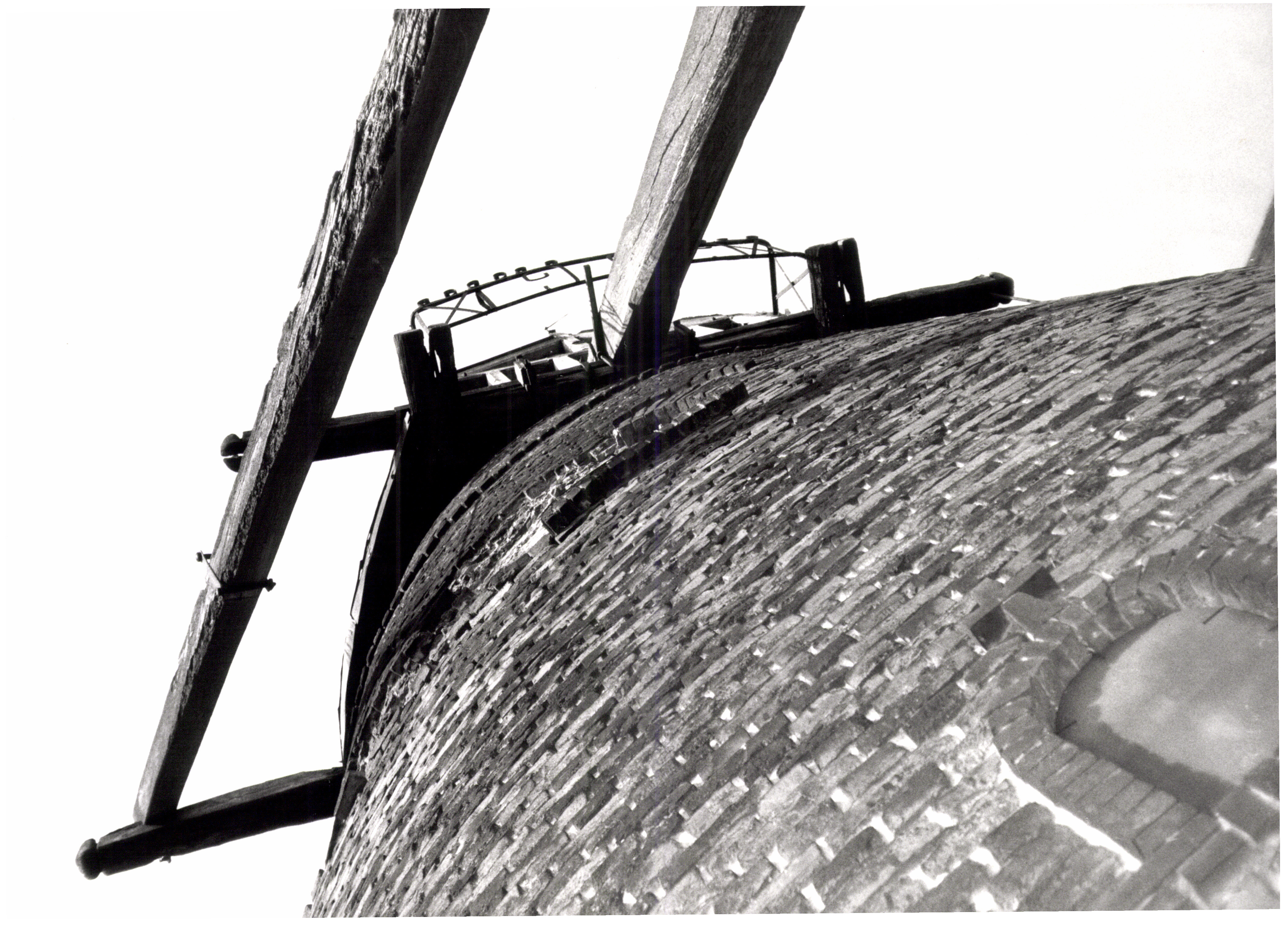 Plaatsmolen of Molen Goethals